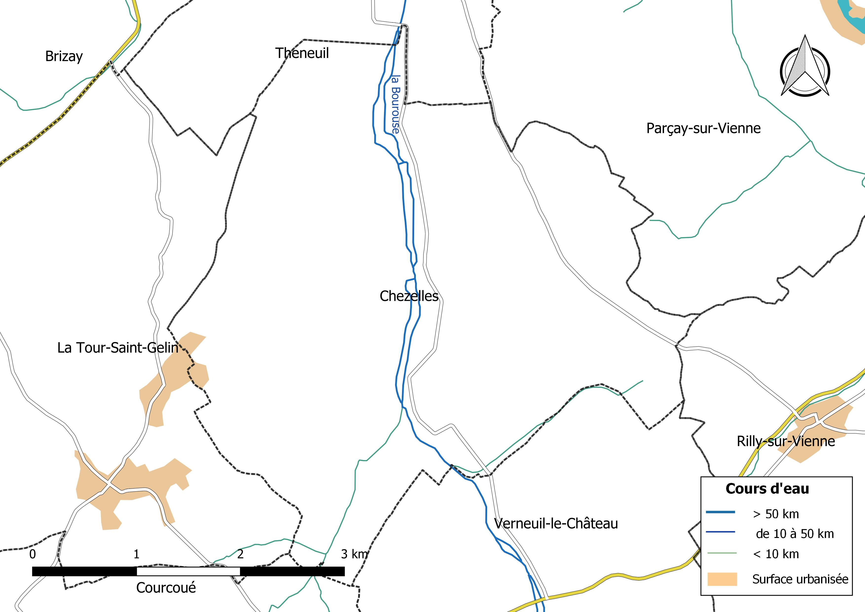 Carte du réseau hydrographique de la commune de Chezelles (Indre-et-Loire) (France).